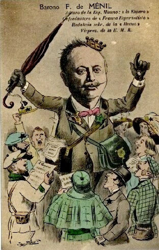 Cartolina del 1911, disegnata da Jean-Robert ed edita dalla Alice-Leontine Farges Esperanto Oficejo, Librejo, Eldonejo di Lione (Francia), per l'Unua Franca Kongreso de Esperanto.